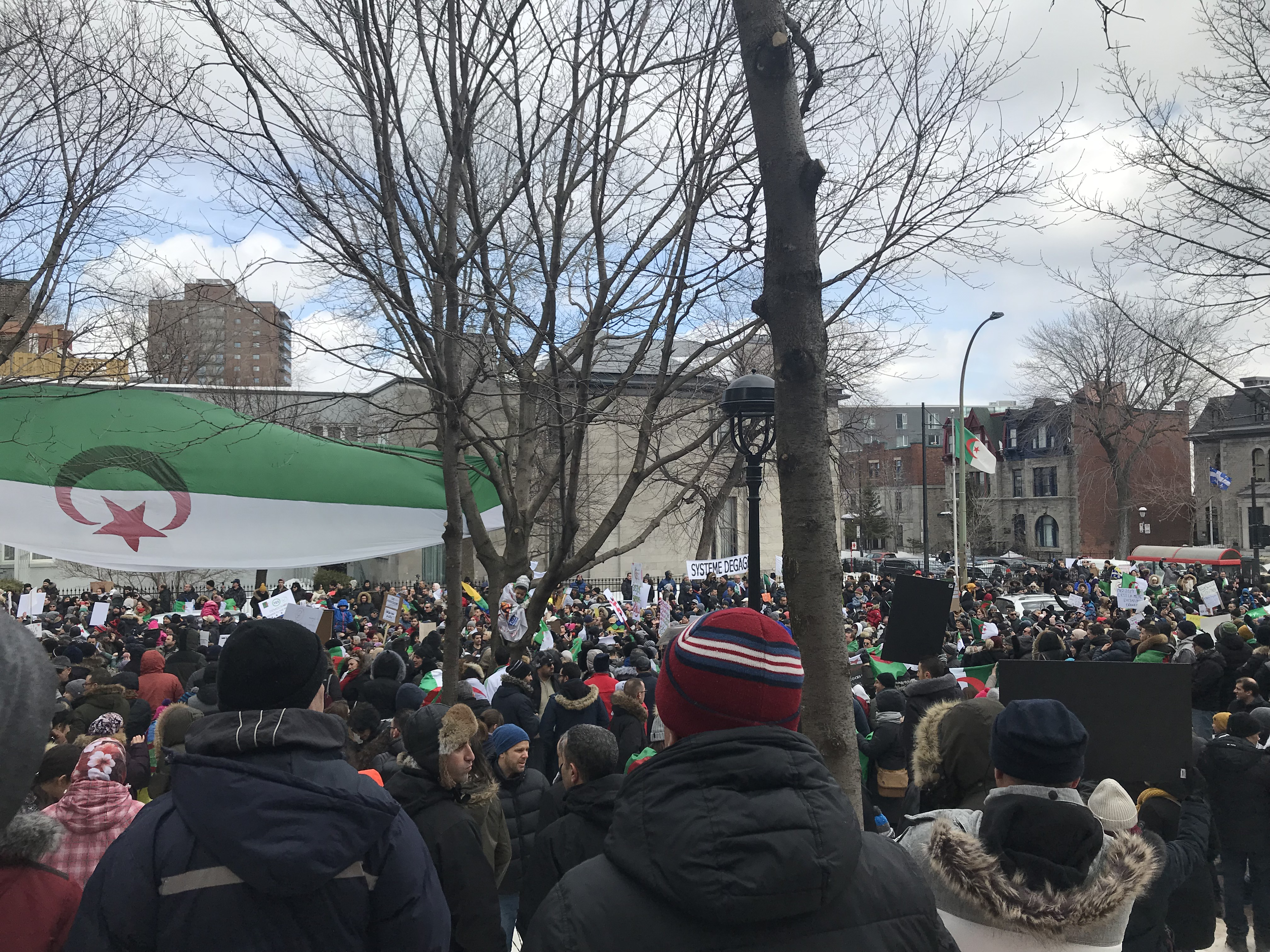 Manifestation à Montréal d'Algériens contre le 5e mandat